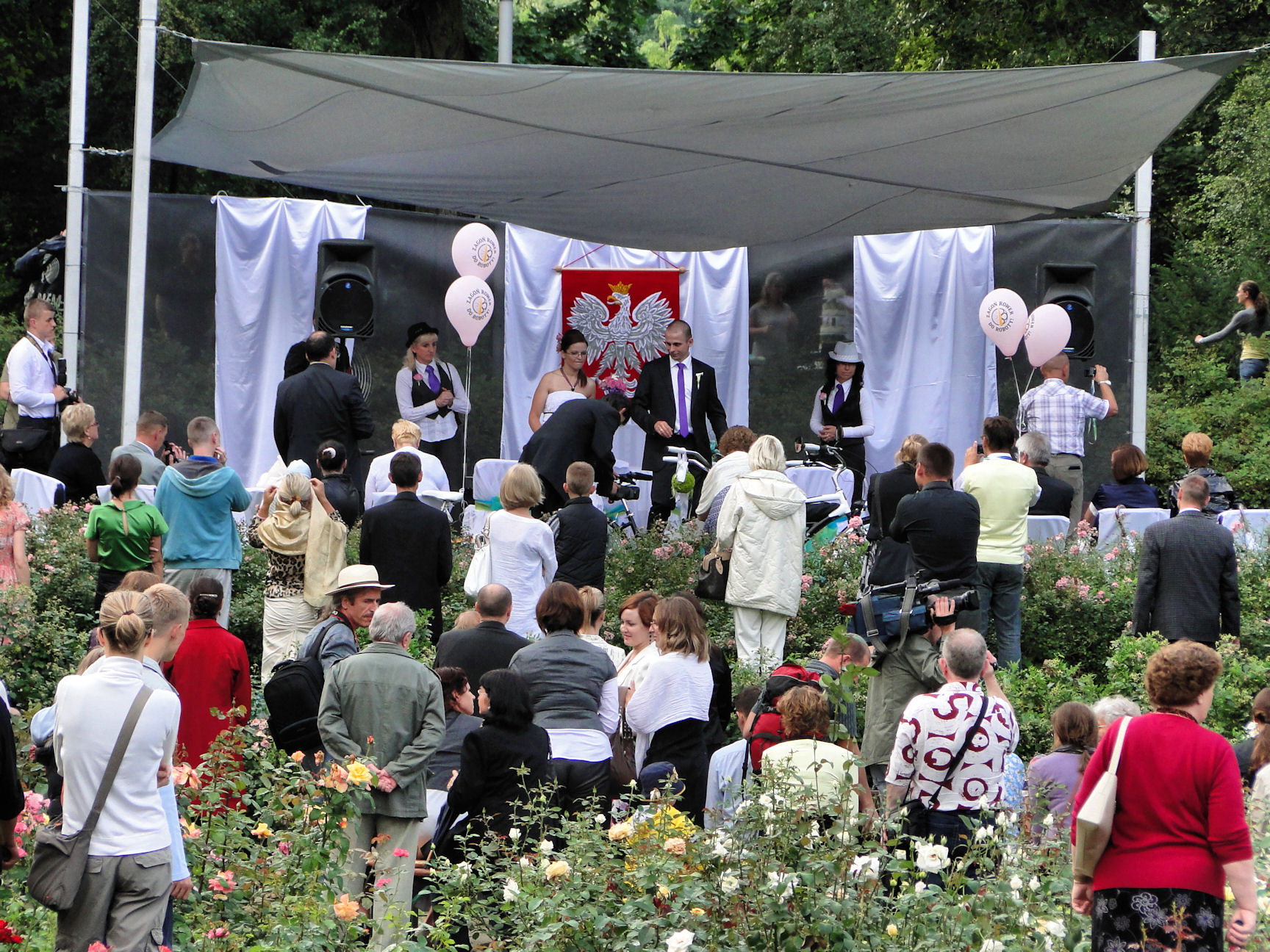 Uroczystość zawarcia związku małżeńskiego w Ogrodzie Różanym w Szczecinie w dniu 14.08.2010